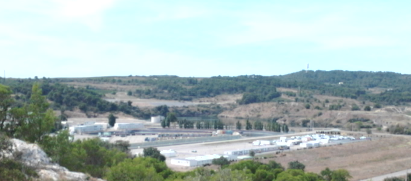 Photo de la base vie et de la zone de stockage du yellow cake prise depuis l'Oppidum de Montlaurès.